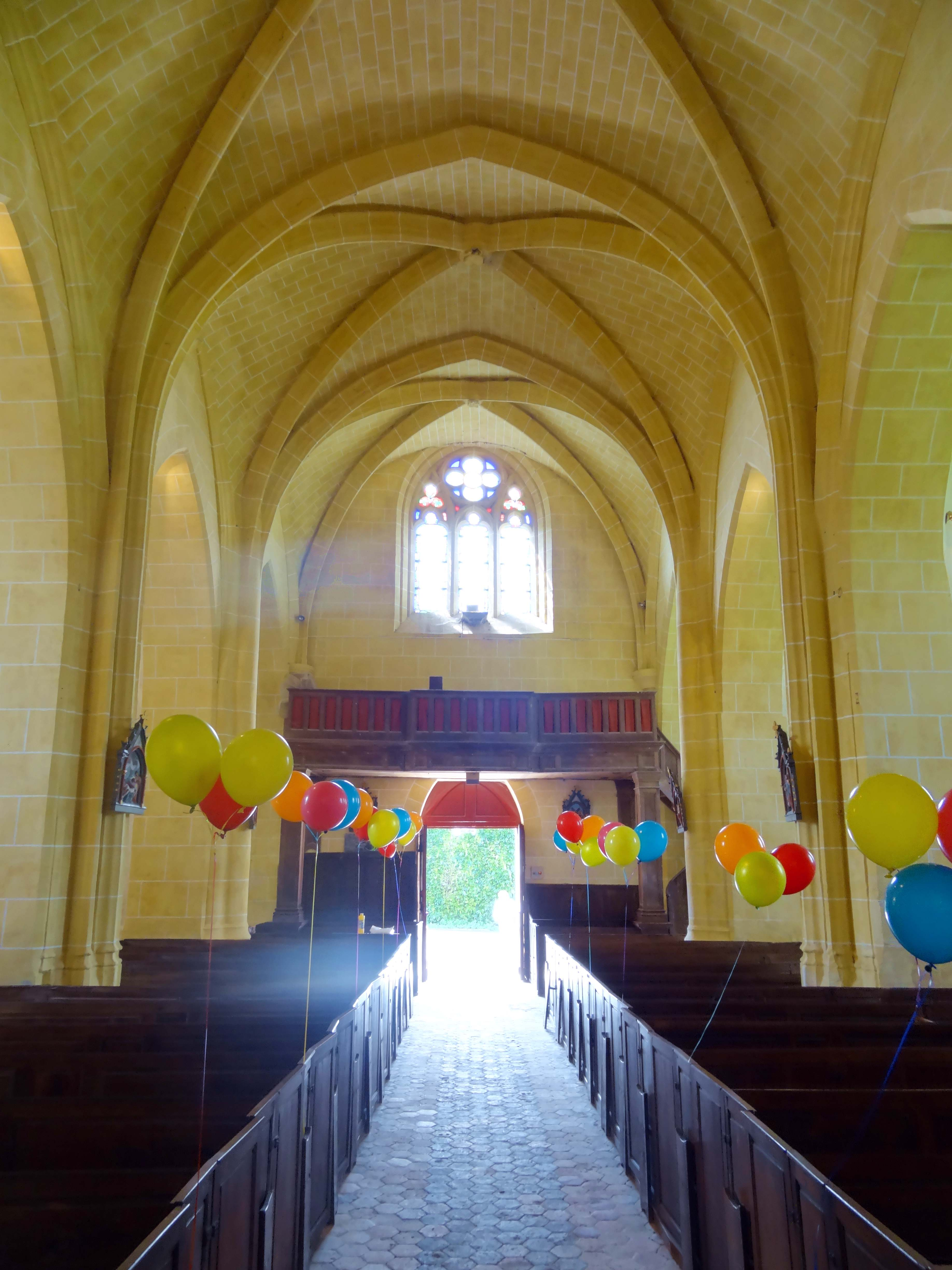 Intérieur de l'église - voir titre.